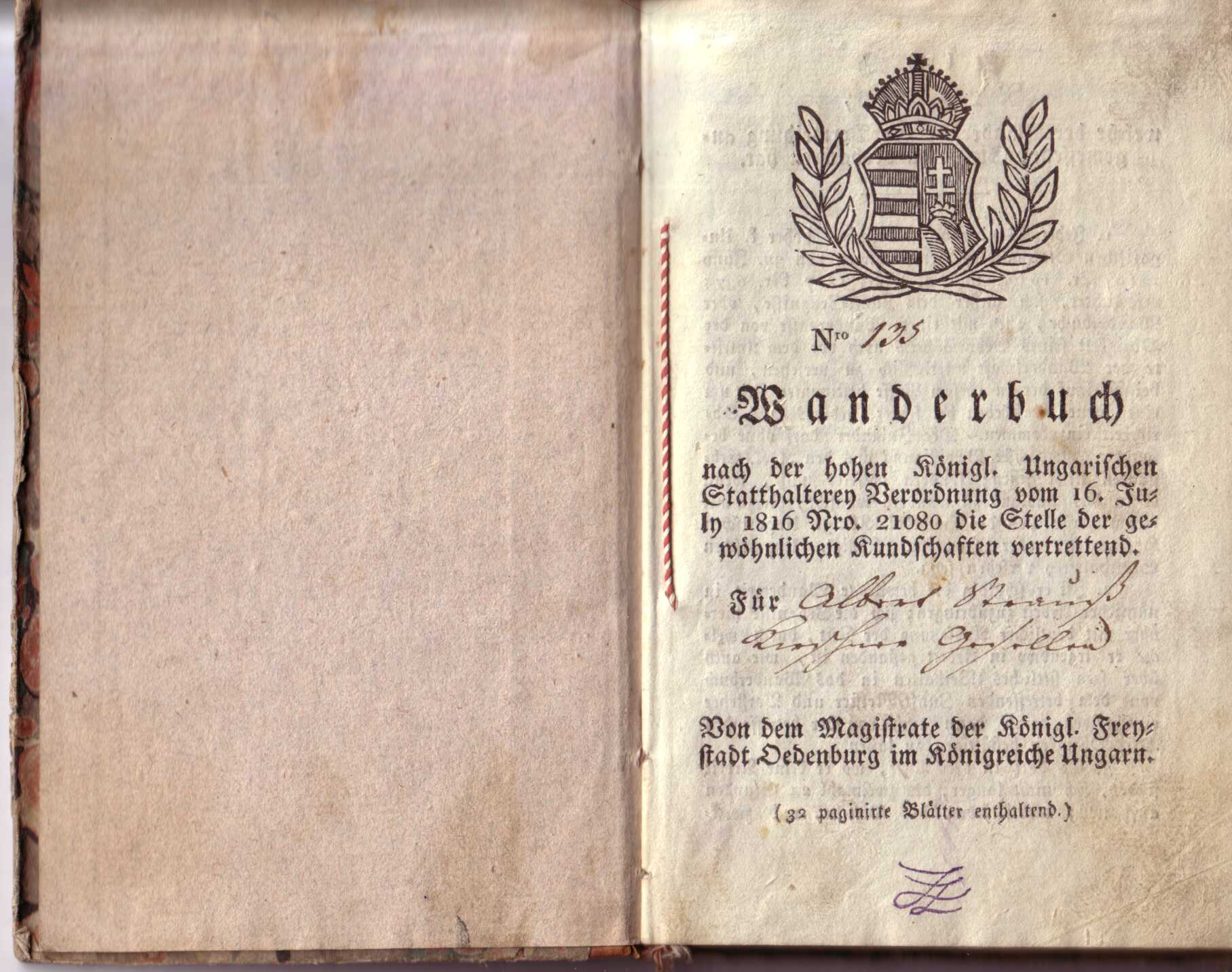 Travelling book of a German-Hungarian furrier / Wanderbuch des Kürschnergesellen Albert Strauß, 1816 Nro 135 Wanderbuch nach der Hohen Königl. Ungarischen Statthalterey Verordnung vom 16. July 1816 Nro. 21080 die Stelle der gewöhnlichen Kundschaften vertrettend. Für Albert Strauß Kürschner Geselle Von dem Magistrate der Königl. Freystadt Oedenburg im Königreiche Ungarn. (32 paginirte Blätter enthaltend.)